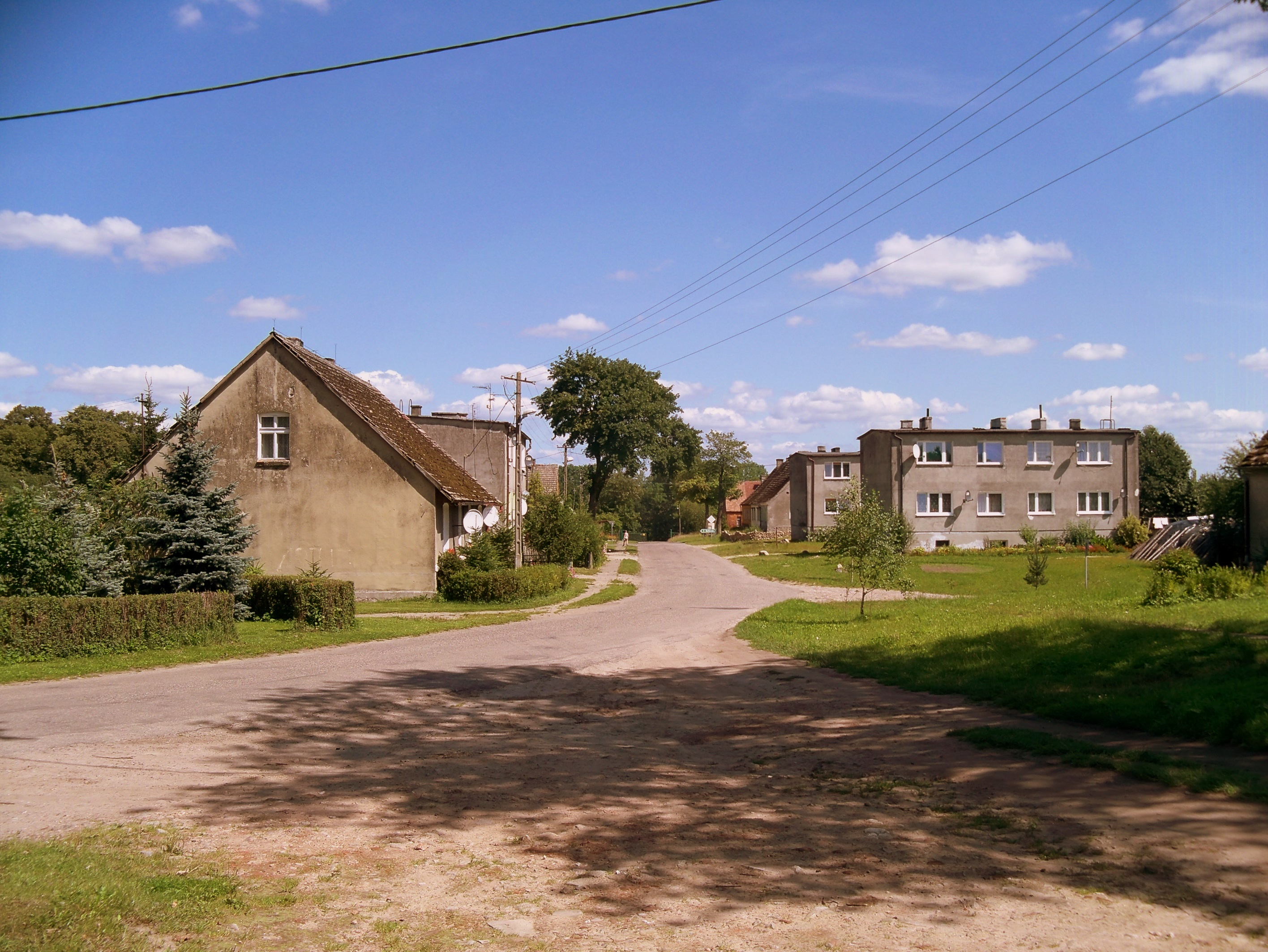 widok wsi od strony kościoła.